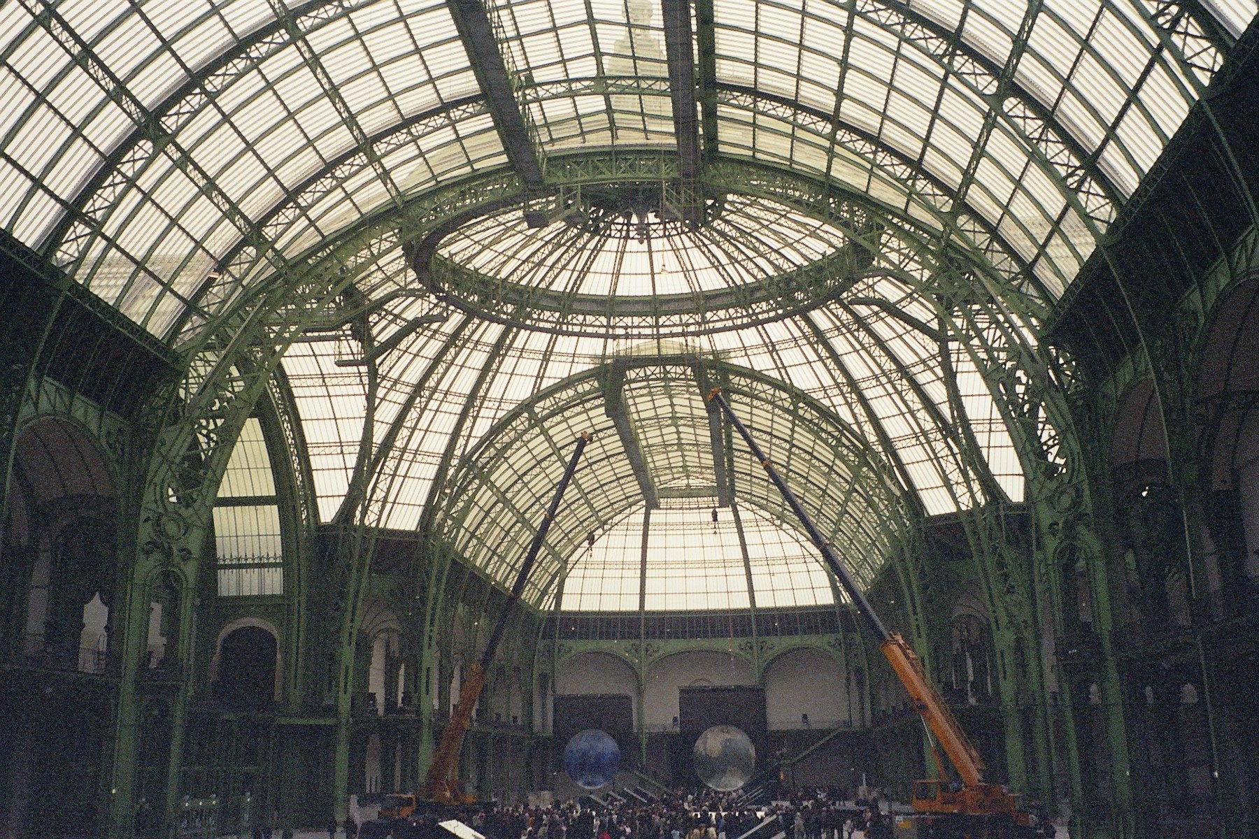 Grand Palais, Paris, France